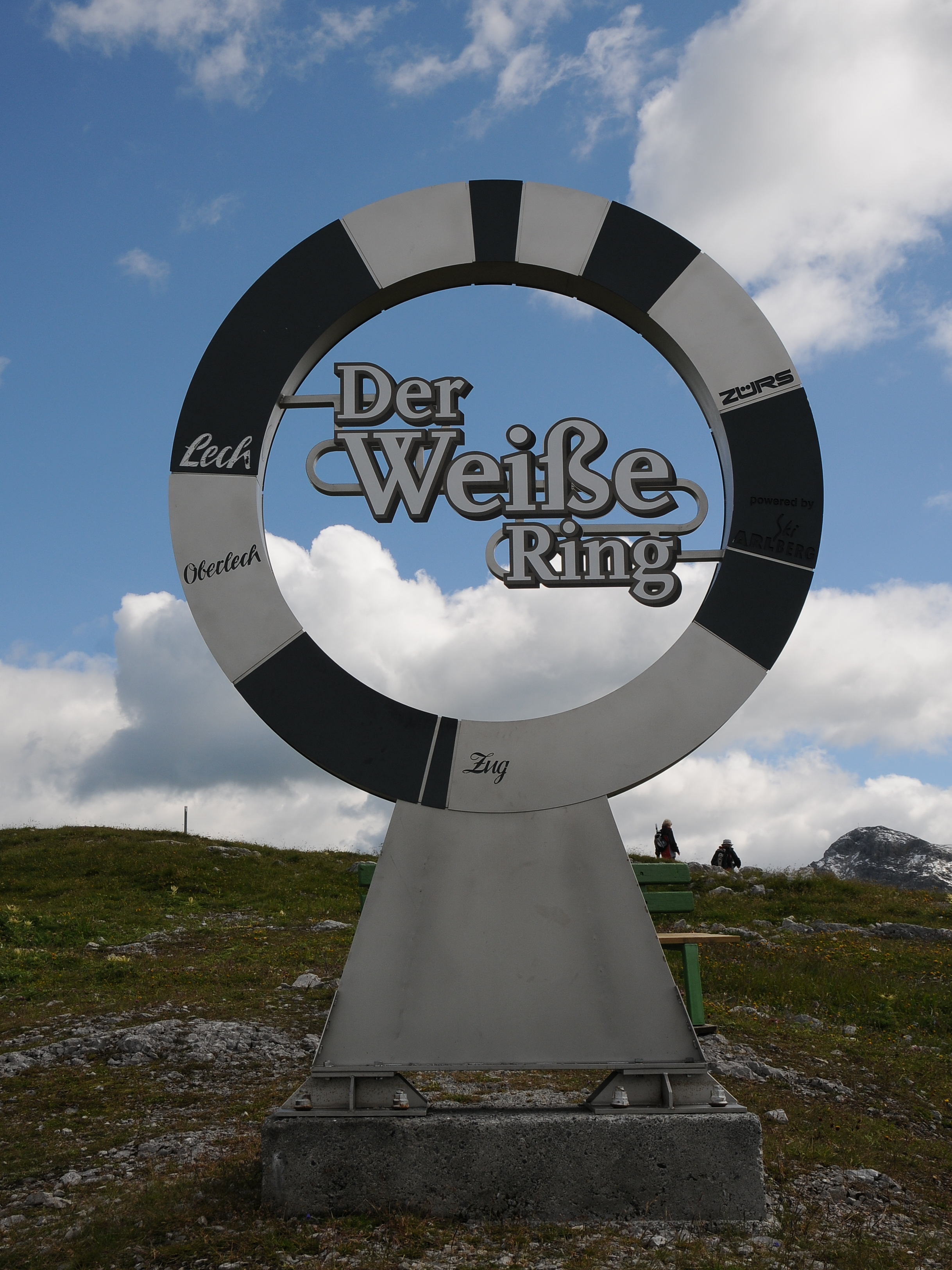 Der weiße Ring bezeichnet eine Skirunde im Skigebiet Lech am Arlberg sowie das längste Skirennen der Welt auf eben dieser. Diese Installation steht an der Bergstation der Rüfikopfbahn.